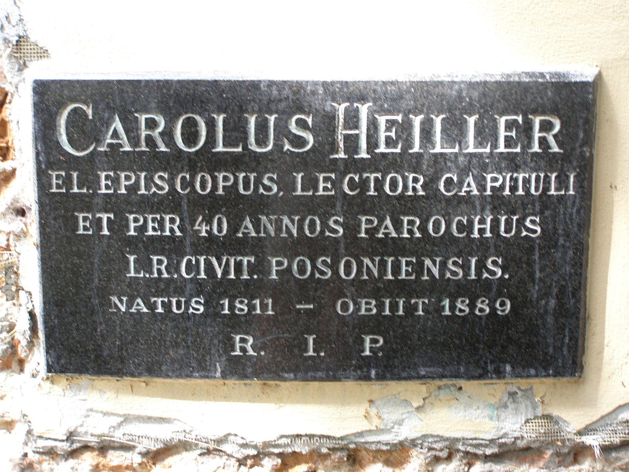 Náhrobná tabuľa farára Karola Heillera (1811 - 1889) na múre kostola. Dlhoročný farár Dómu svätého Martina sa významnou mierou zaslúžil o všestranný rozvoj Bratislavy